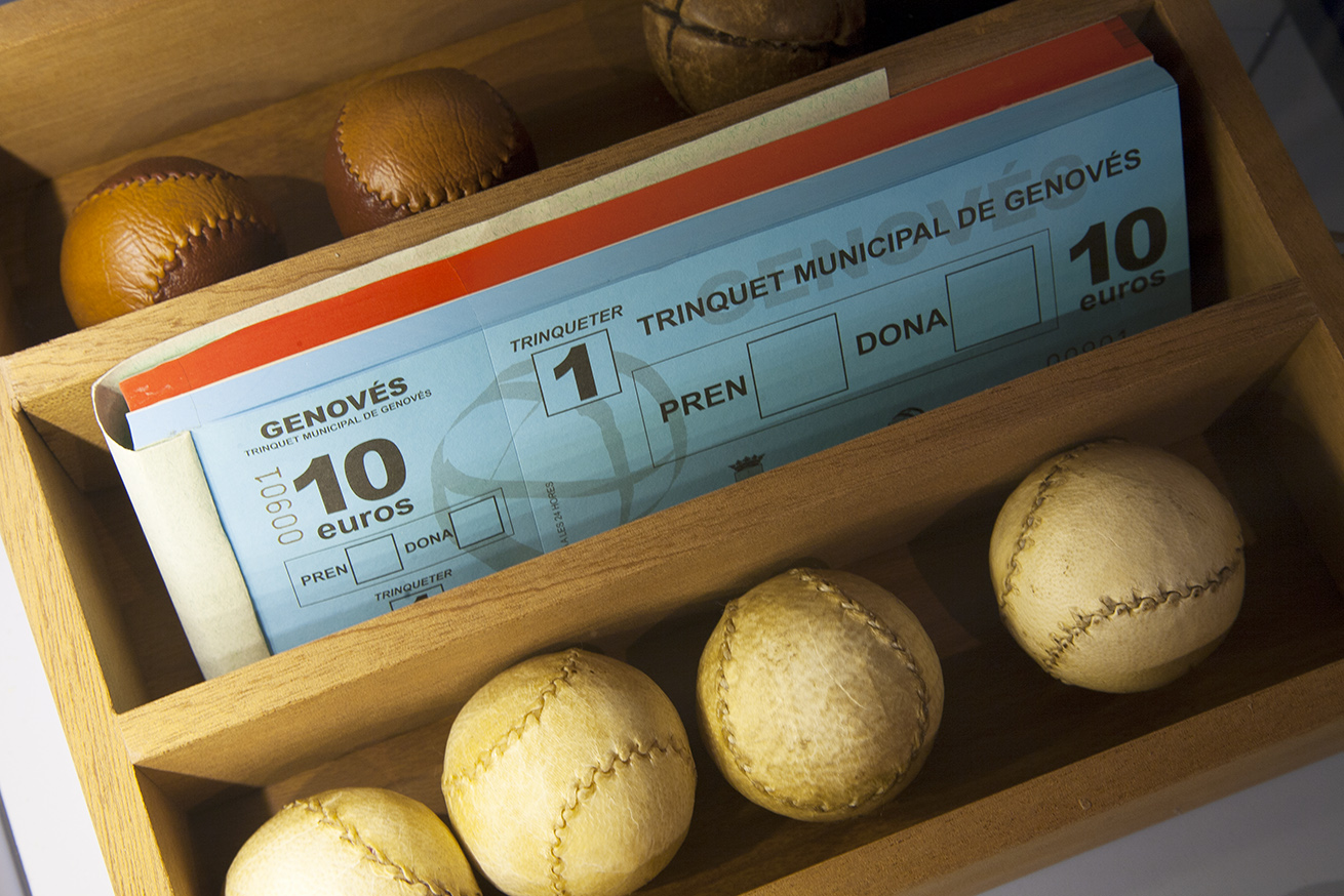 Fotografies d'Hèctor Juan de l'exposició temporal del Museu Valencià d'Etnologia "Faixa roja, faixa blava".